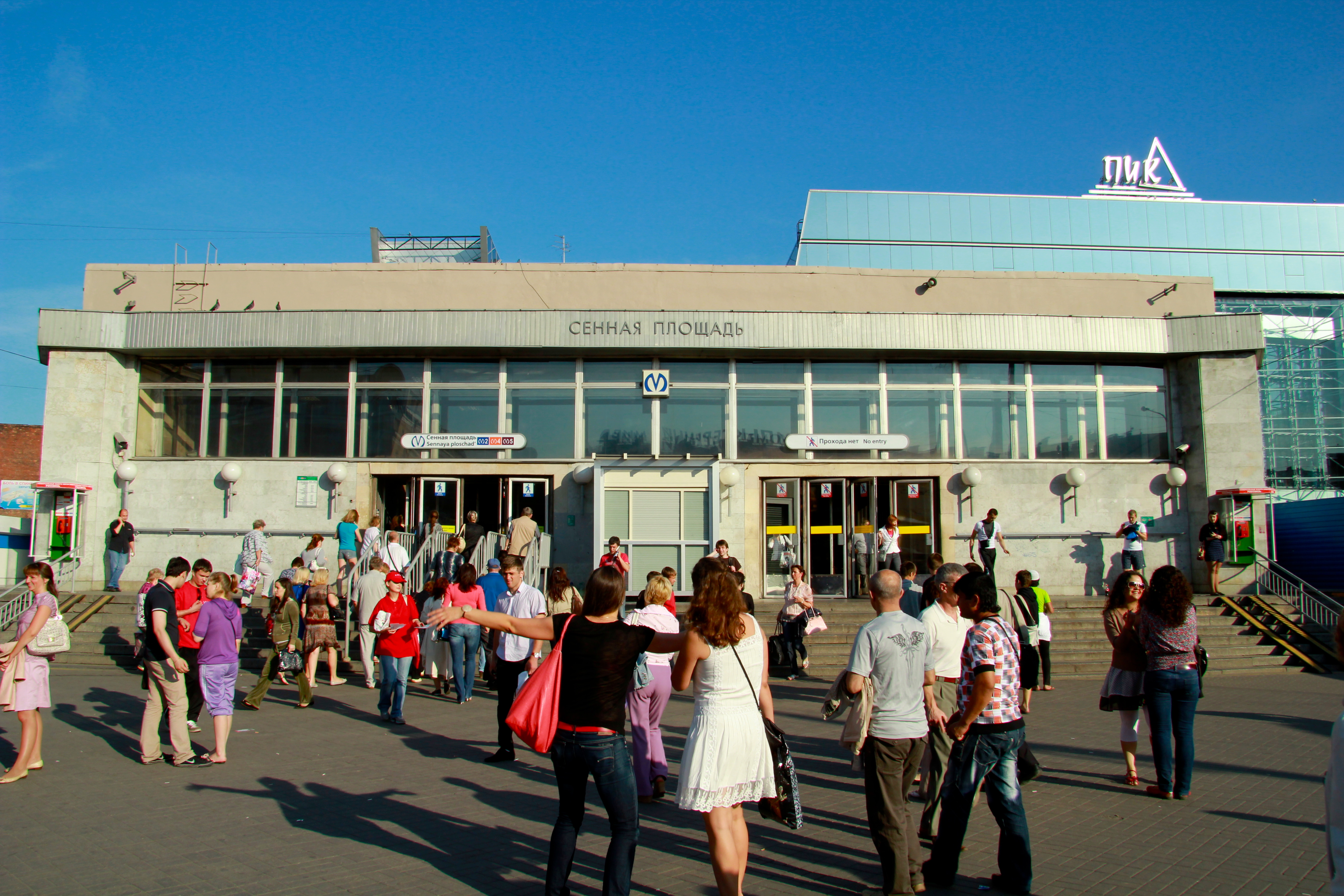 St. Petersburg Metro (Петербургский метрополитен) Moskovsko-Petrogradskaya Line (Московско-Петроградская линия)